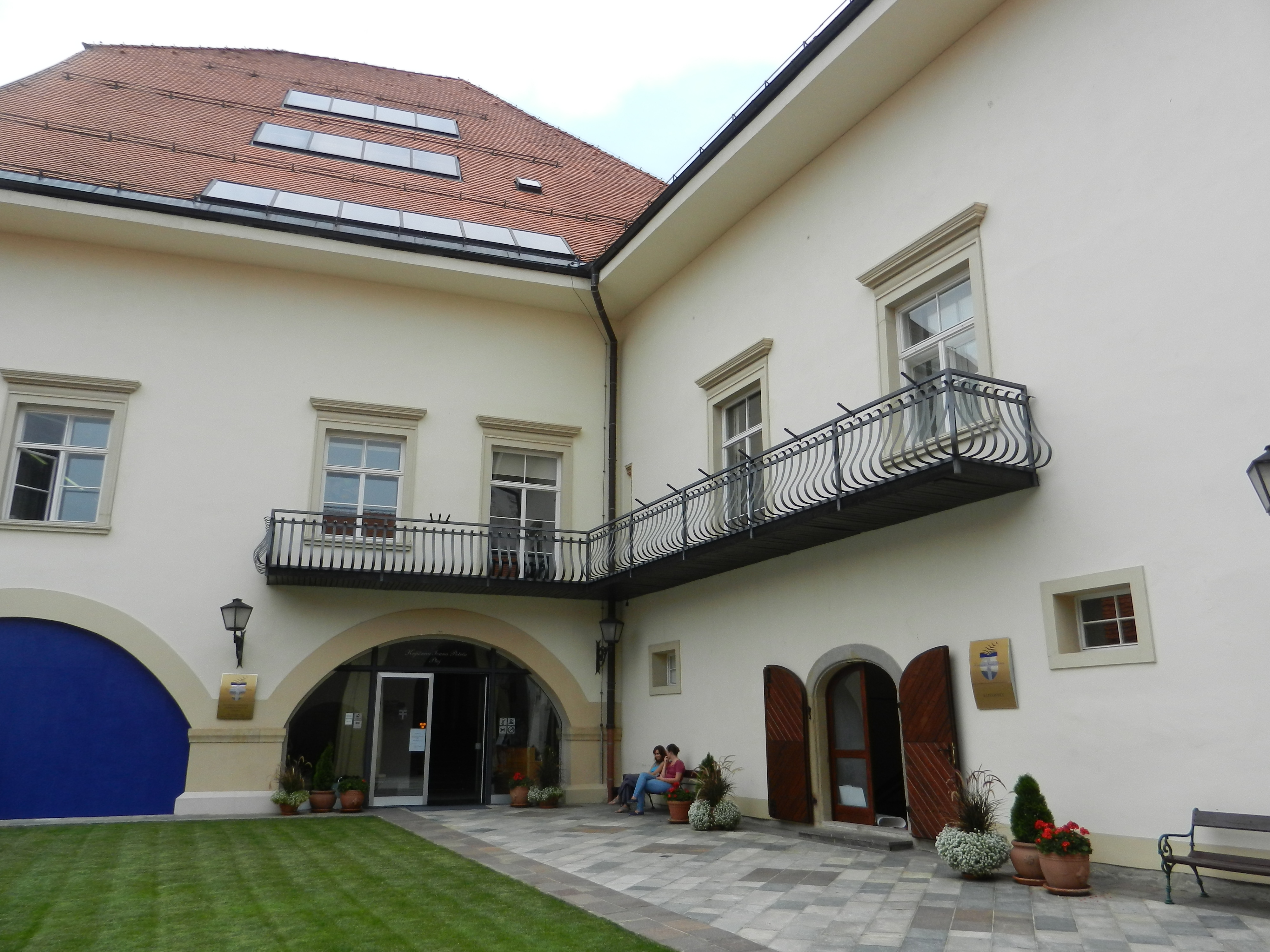 Notranje dvorišče Malega gradu na Ptuju